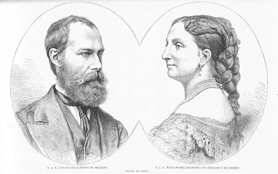 Louis Philippe Albert d'Orléans, comte de Paris (1838-1894) avec son épouse et cousine paternelle Marie-Isabelle d'Orléans (1848-1894), fille d'Antoine d'Orléans, duc de Montpensier et de l'infante Louise Fernande soeur de la reine d'Espagne Isabelle II.